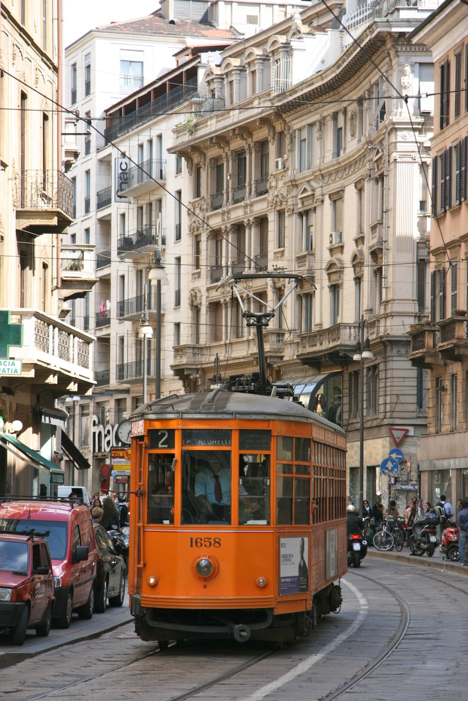 Vettura tranviaria 1658 dell'ATM di Milano in via Torino